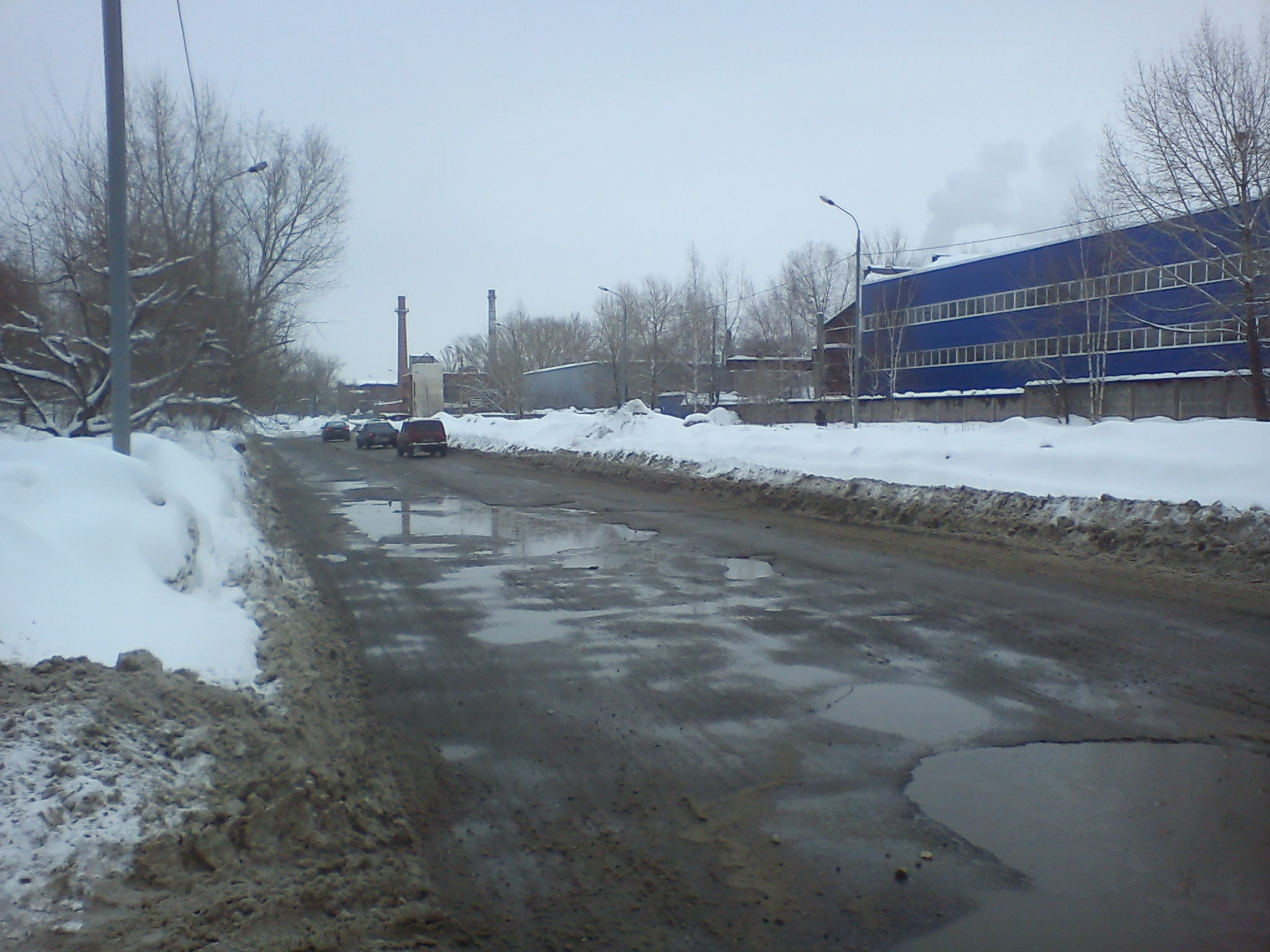 Промзона на улице Кутуя